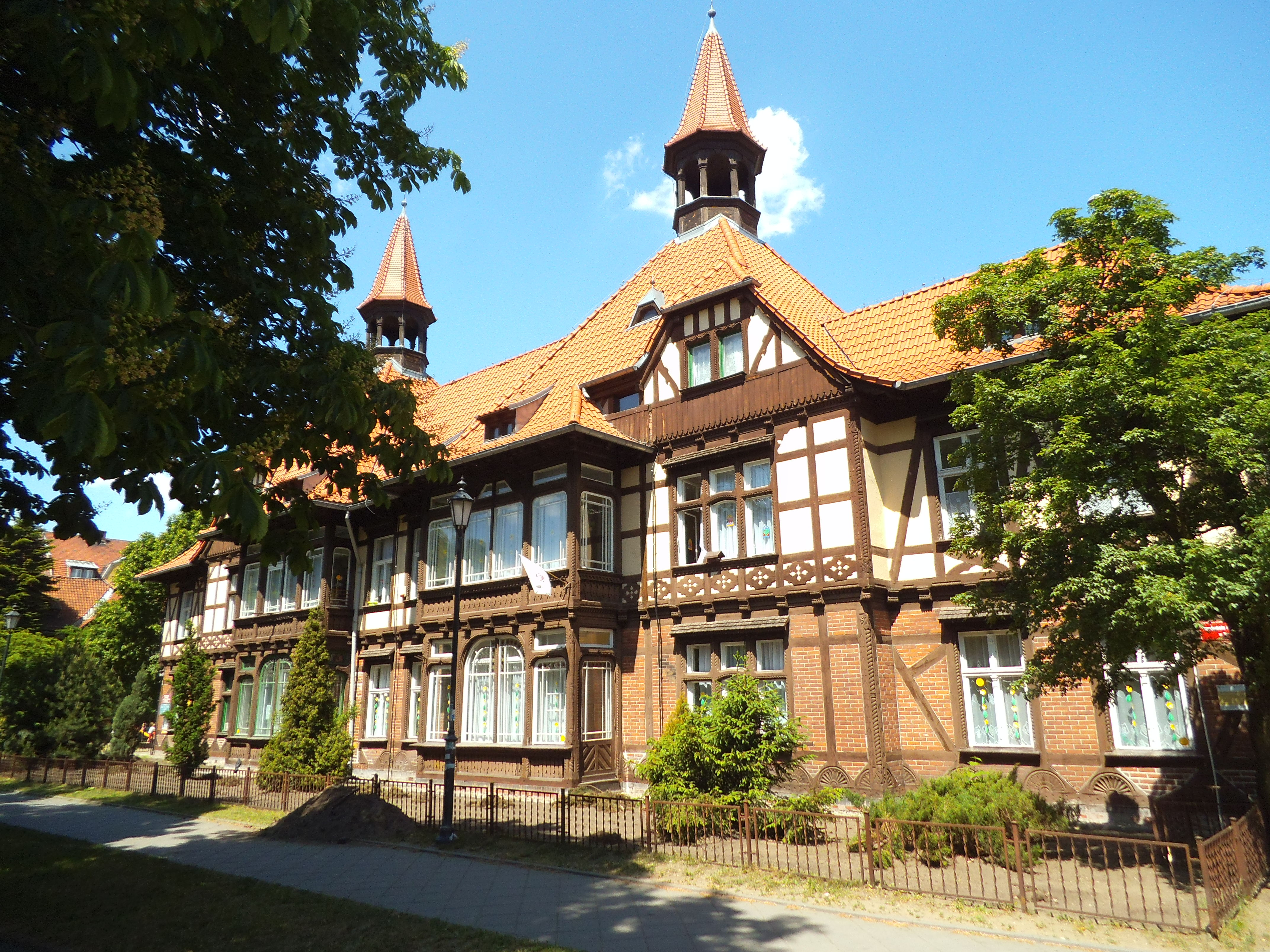 Przedszkola Miejskiego nr 4 w Toruniu